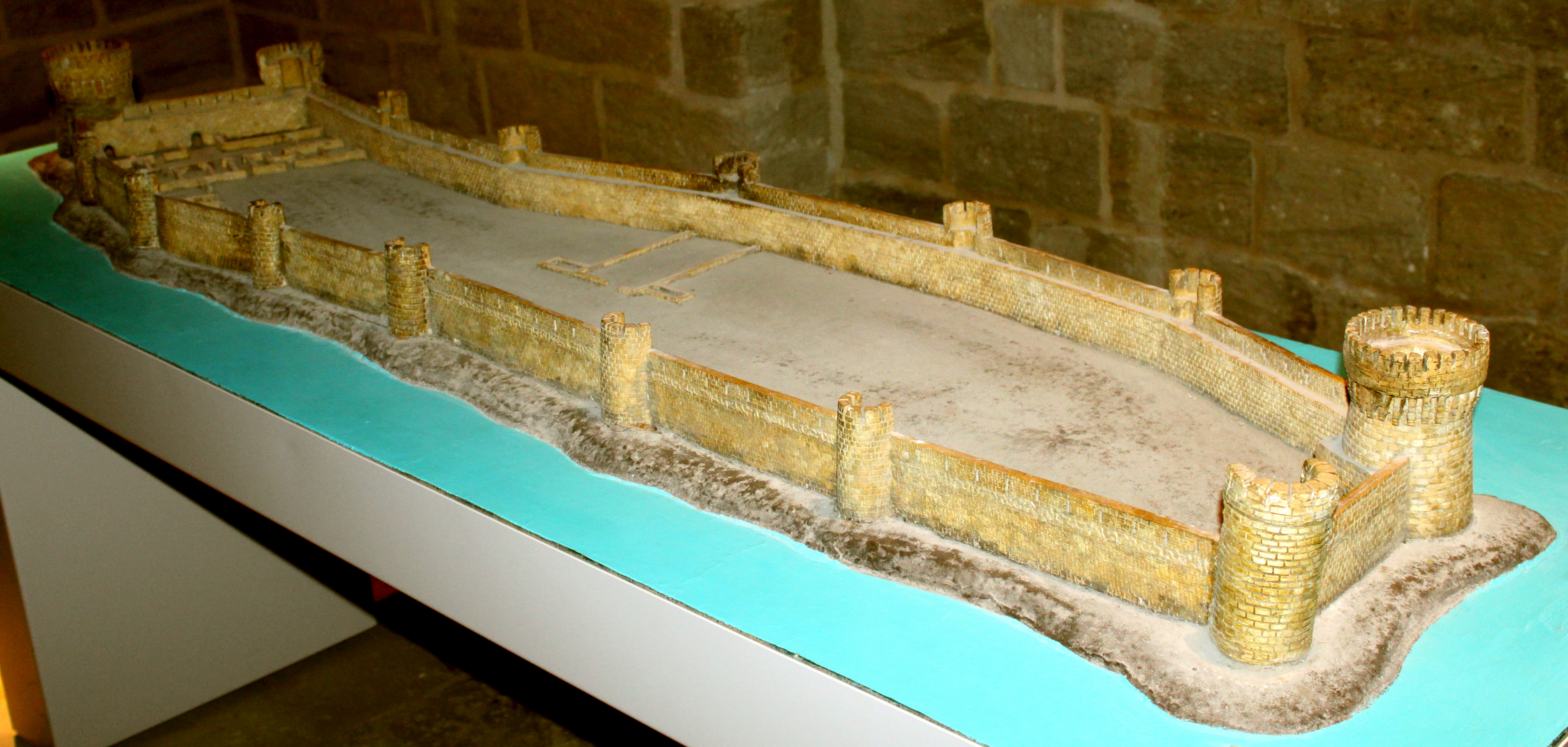 Bayıl qəsri ümumi görünüş